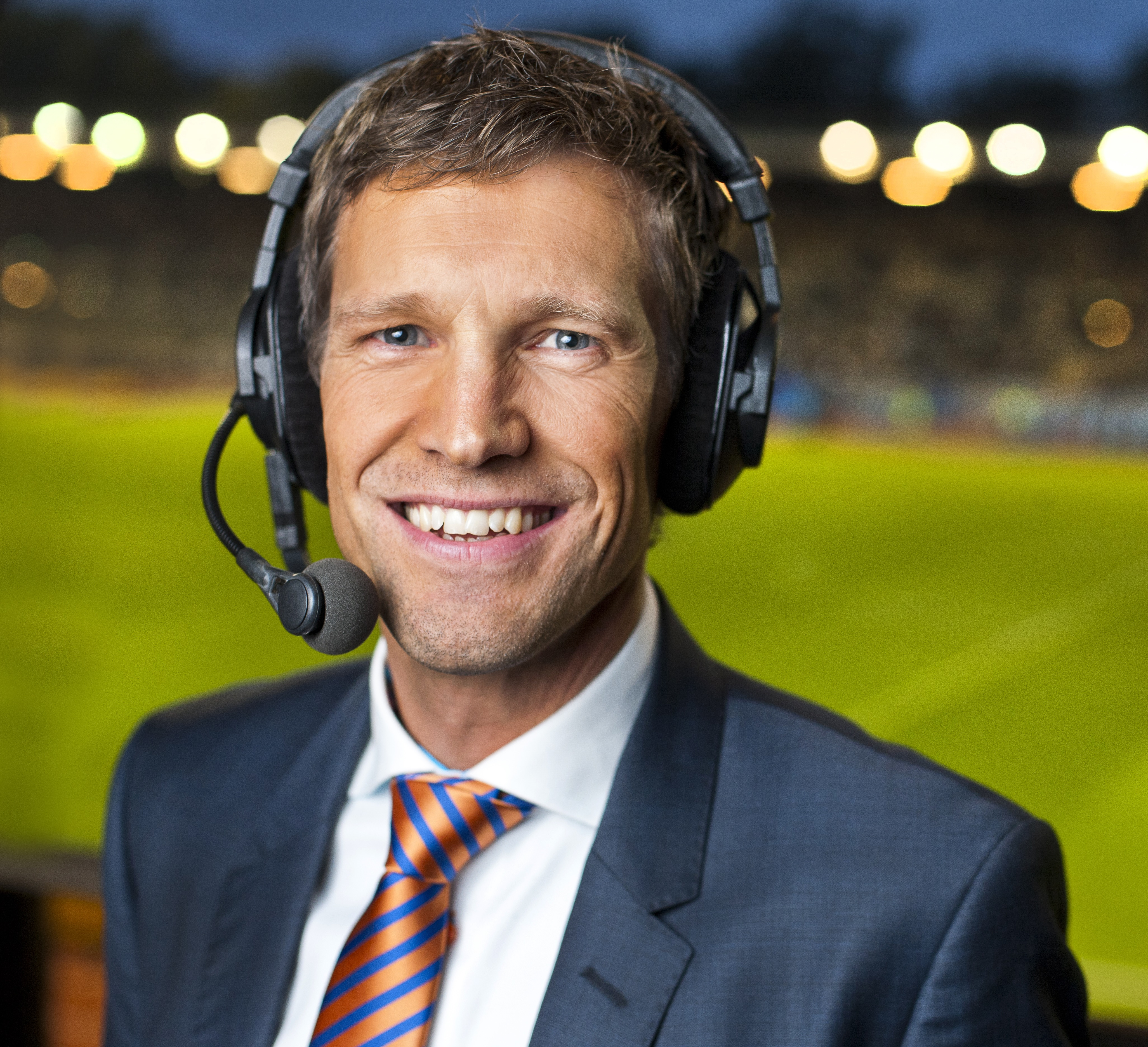 F.d. fotbollsspelaren och kommentatorn Jens Fjällström.